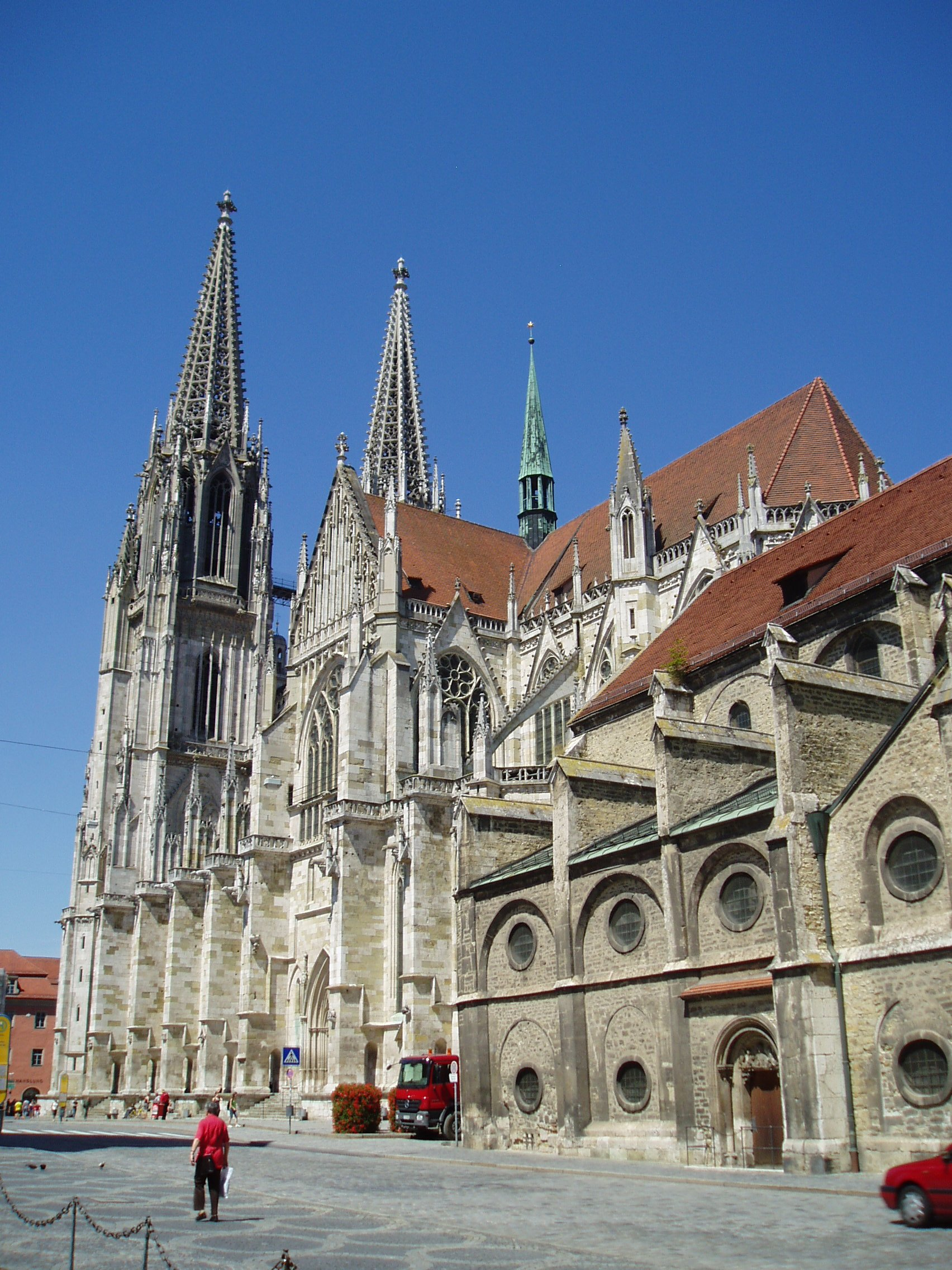 Regensburger Dom